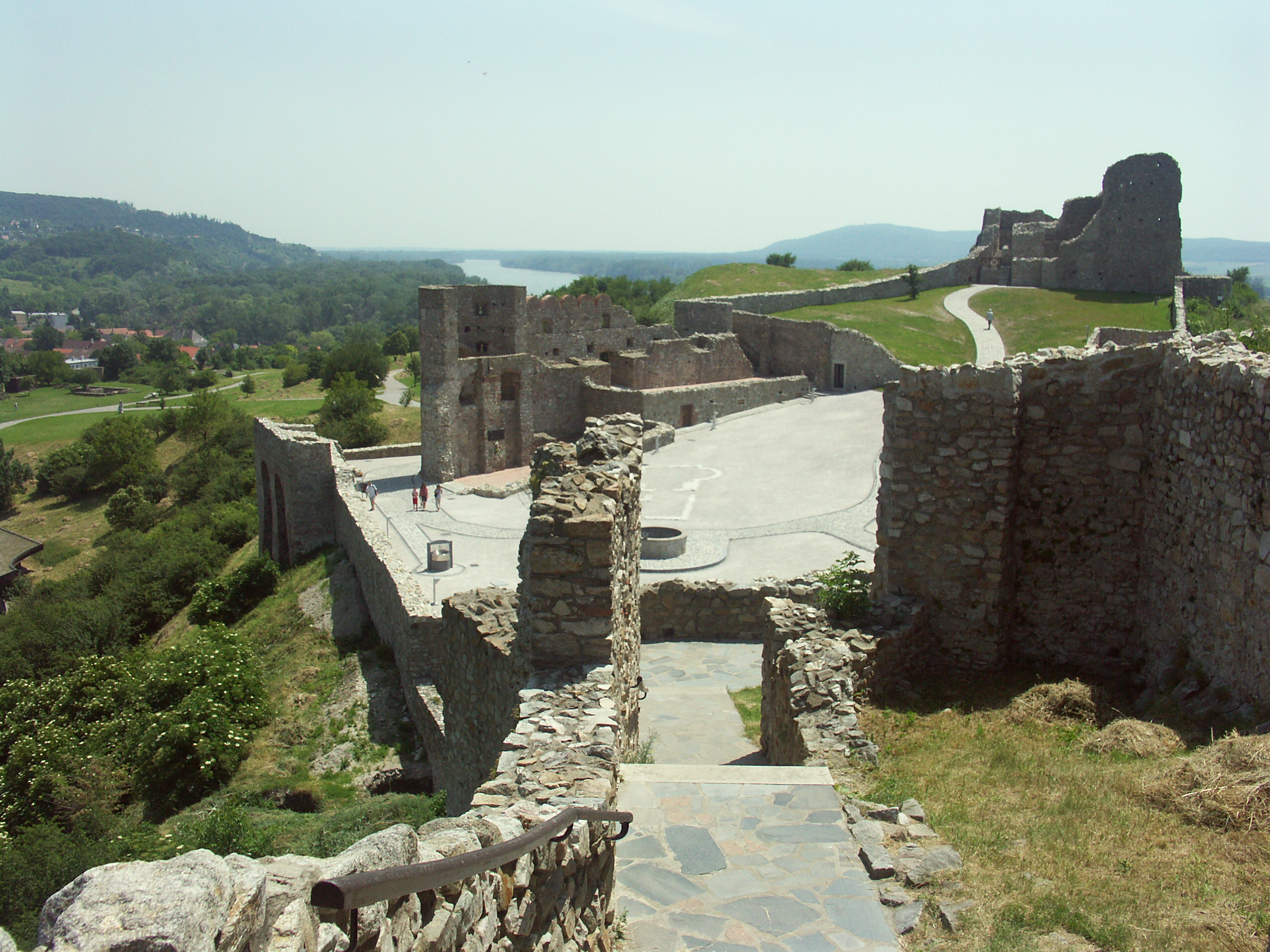 Castle Devín, Bratislava (Devín village), Slovak Republic